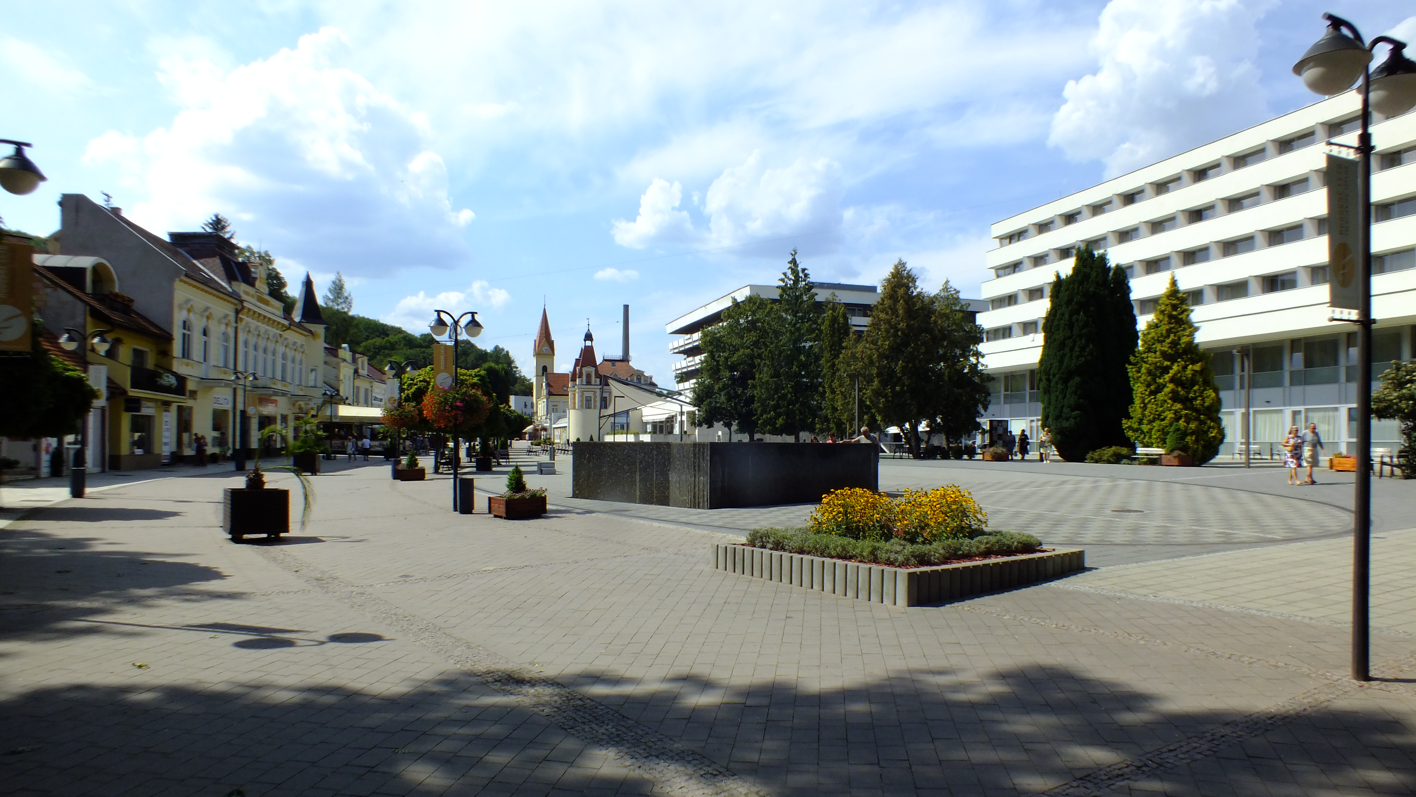 Hlavní náměstí v Trenčianských Teplicích